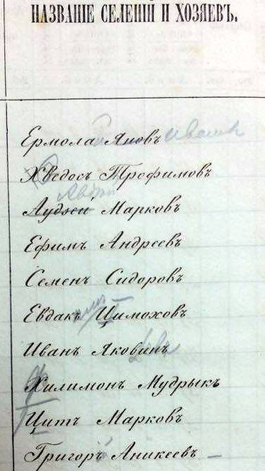 Беларуская (тарашкевіца): Маскалізацыя (русіфікацыя) Вялікага Княства Літоўскага. Сьпіс сялянаў маёнтку Лучыцаў Мазырскага павету, складзены ў 1861 годзе мясцовым пісарам і выпраўлены ў Менску расейскім чыноўнікам: «Ермола Яновъ» — «Ермолай Ивановъ», «Хведосъ» — «Федосъ», «Аудзей» — «Авдей», «Евдакъ Цимоховъ» — «Евдакимъ Тимоховъ», «Хилимонъ» — «Филимонъ», «Цитъ» — «Титъ», «Григоръ» — «Григорий»